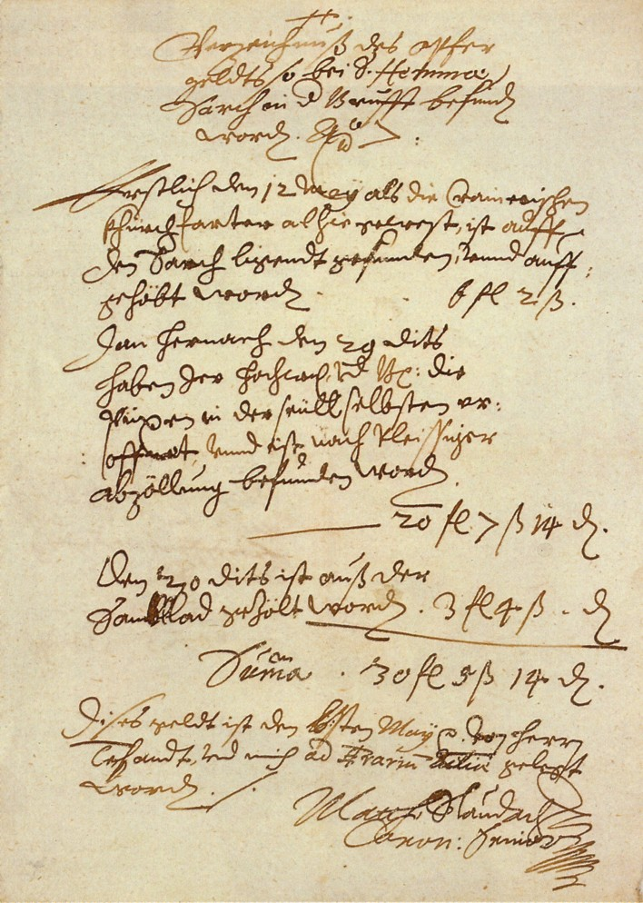 Verzeichnis des Opfergeldes von den Krainer Wallfahrern, 1607